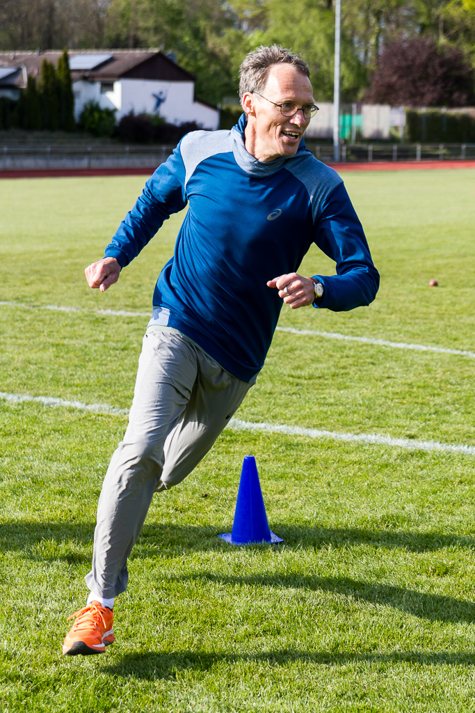 Dieter Baumann am 28. April 2017 in Pfungstadt